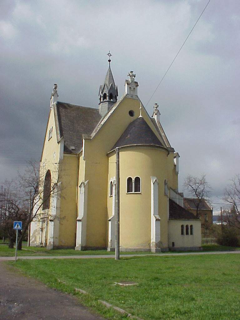 church in Předlice